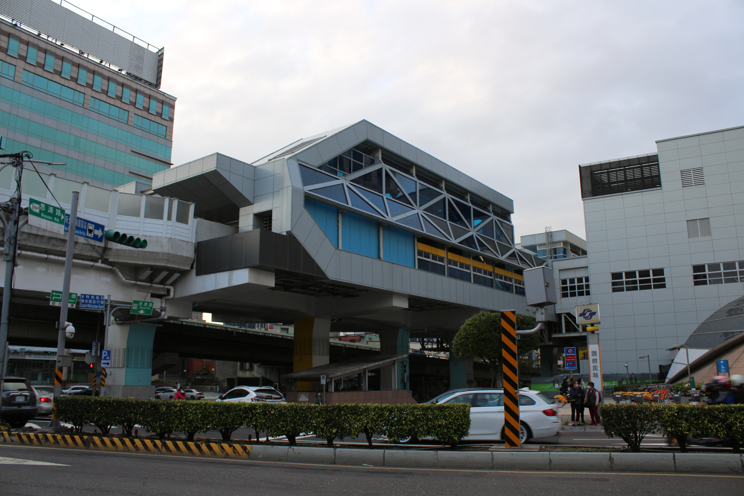 Taipei Metro Touqianzhuang Station